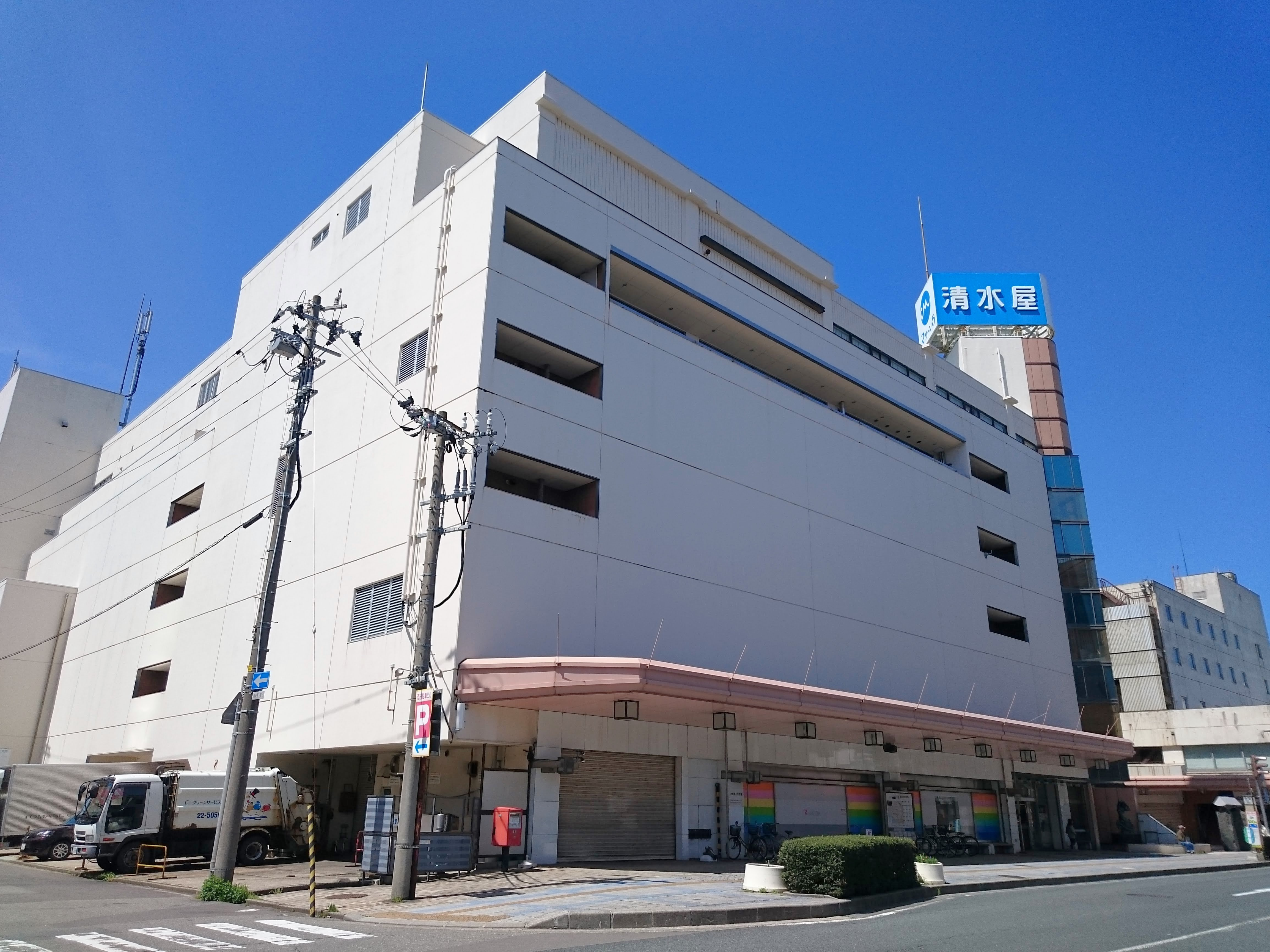 マリーン5清水屋の建物外観